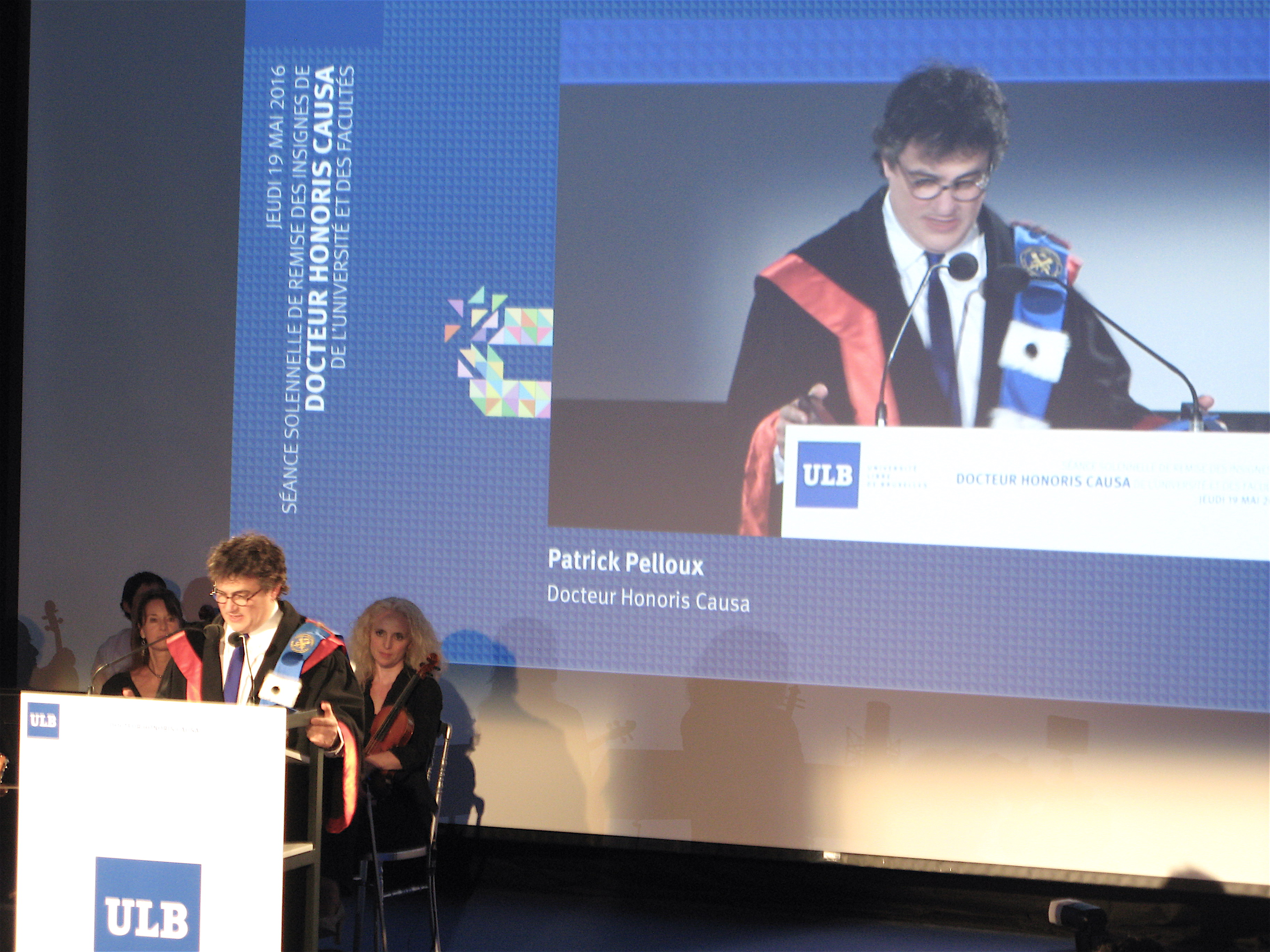 Patrick Pelloux lors de son discours DHC à l'ULB le 19 mai 2016